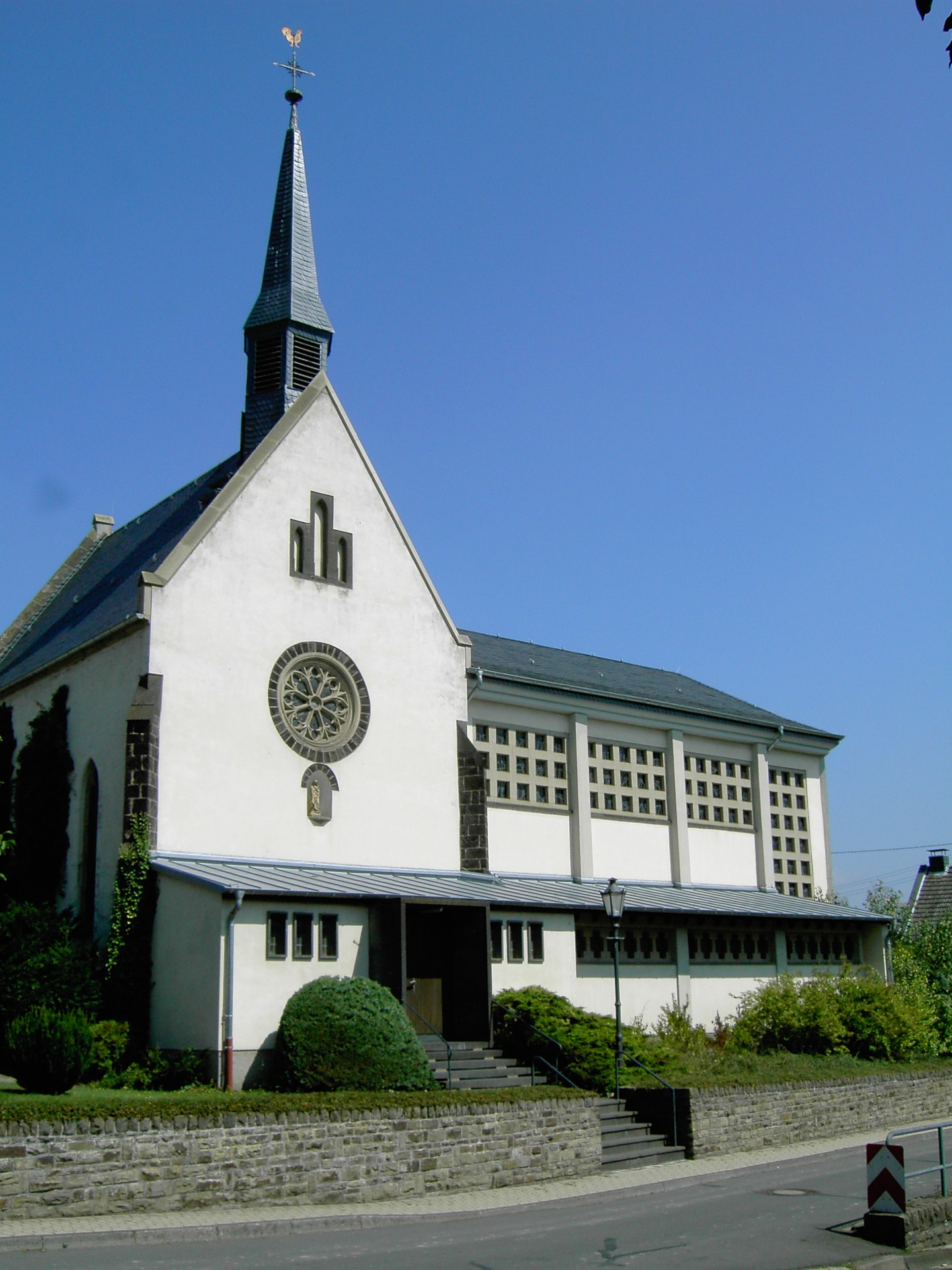 Kirche der Gemeinde Kretz